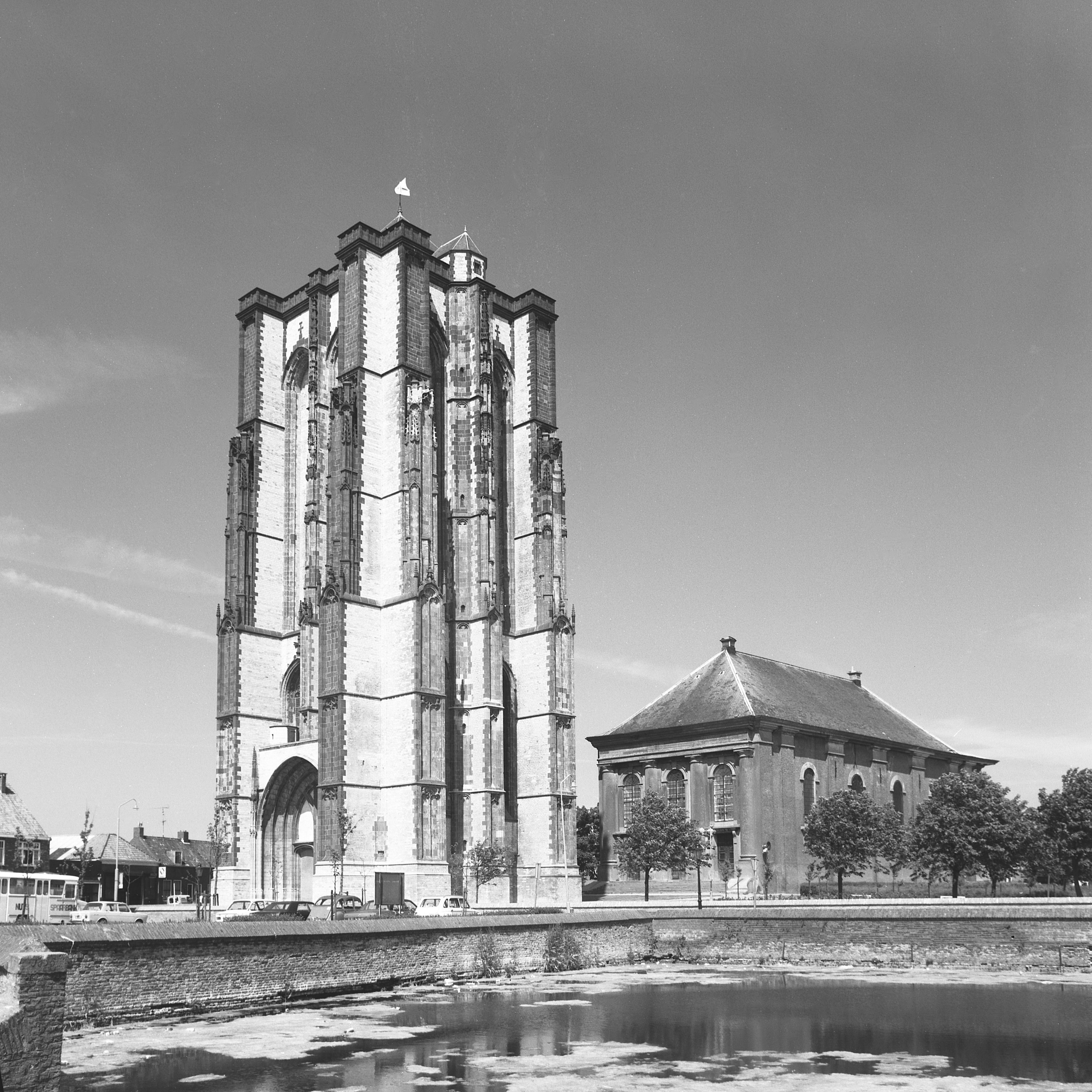 Zuid-westzijde van de Sint-Lievensmostertoren en de Nieuwe kerk